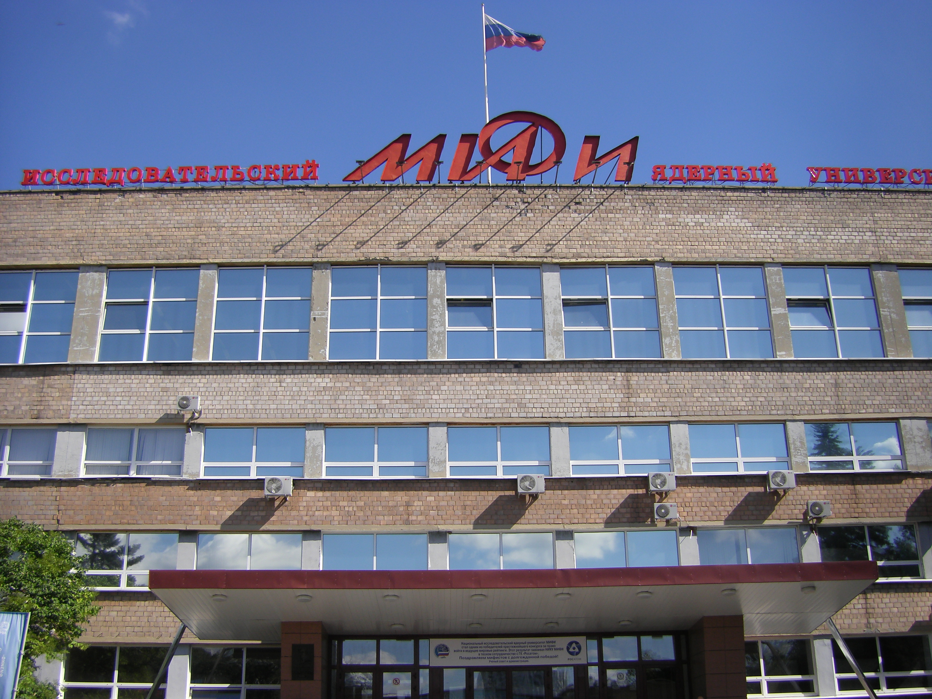 Вид на главный корпус МИФИ. Одна из последних моих фотографий, сделанных внутри МИФИ — в этот день, кажется, получал диплом на руки.